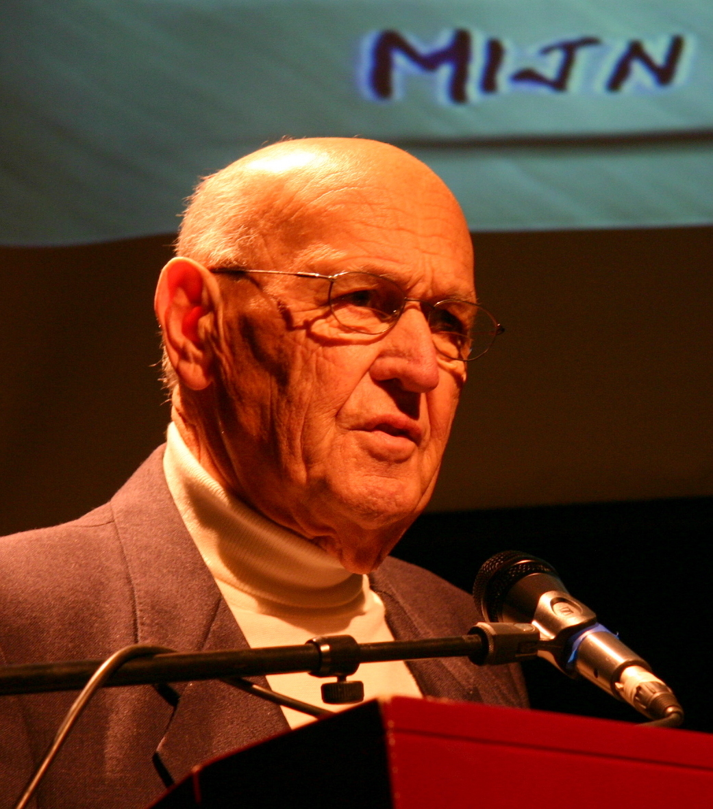 Piet van Hout